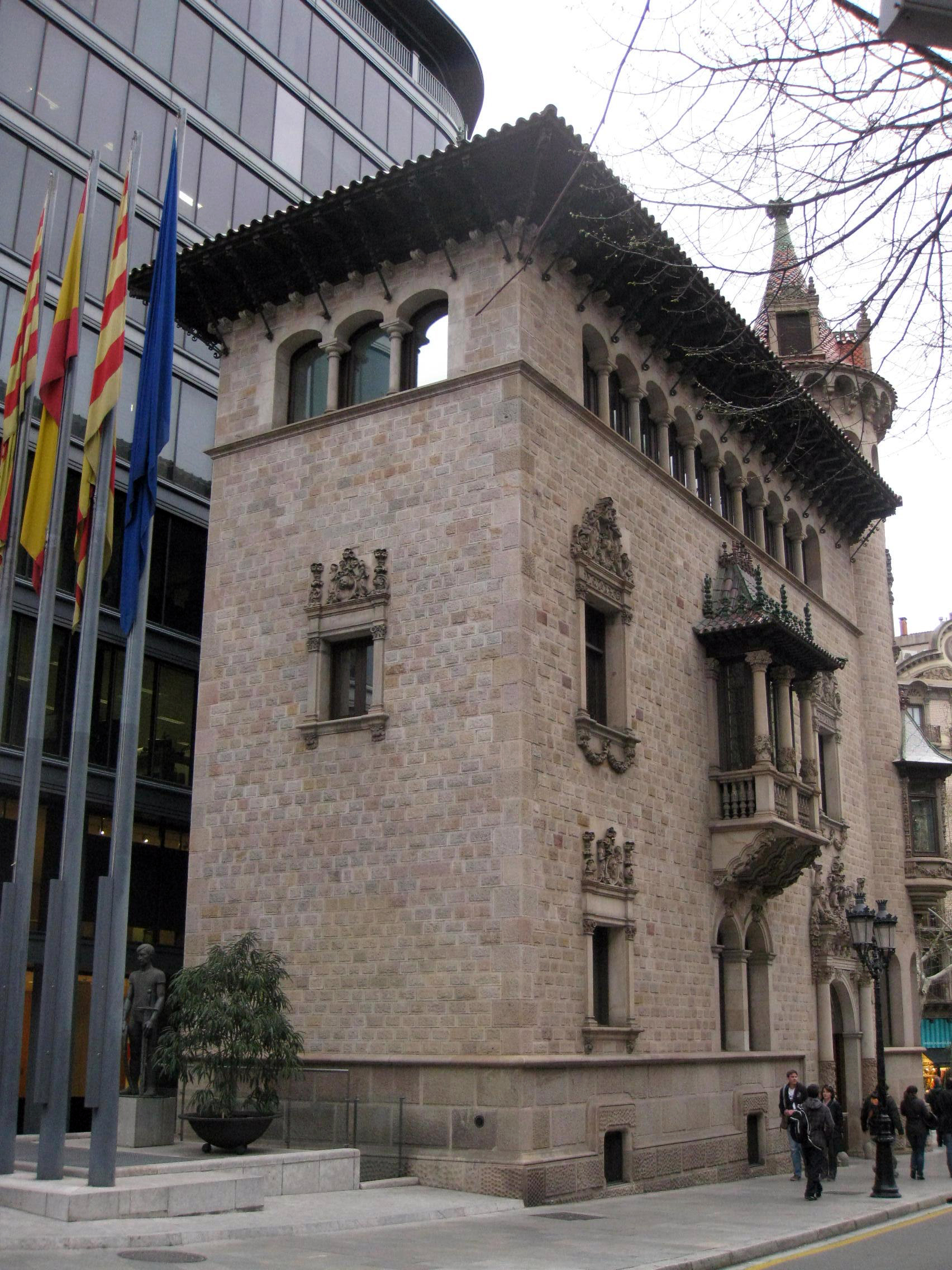 Casa Serra (Barcelona) Object location41° 23′ 44.48″ N, 2° 09′ 28.01″ E